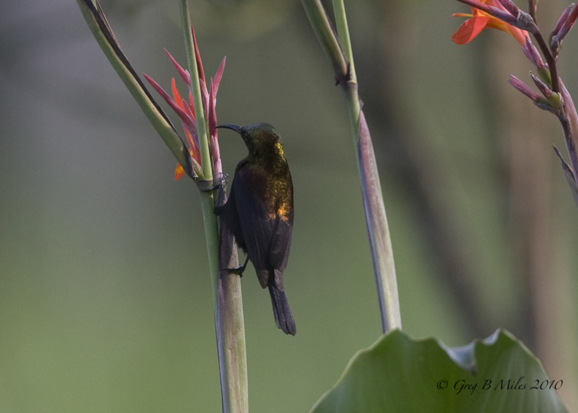 Copper Sunbird